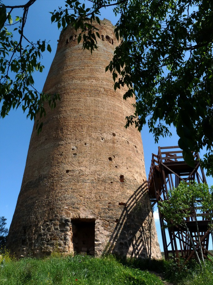 Torre de Vallferosa (Torà) Object location41° 51′ 42.1″ N, 1° 26′ 43.85″ E